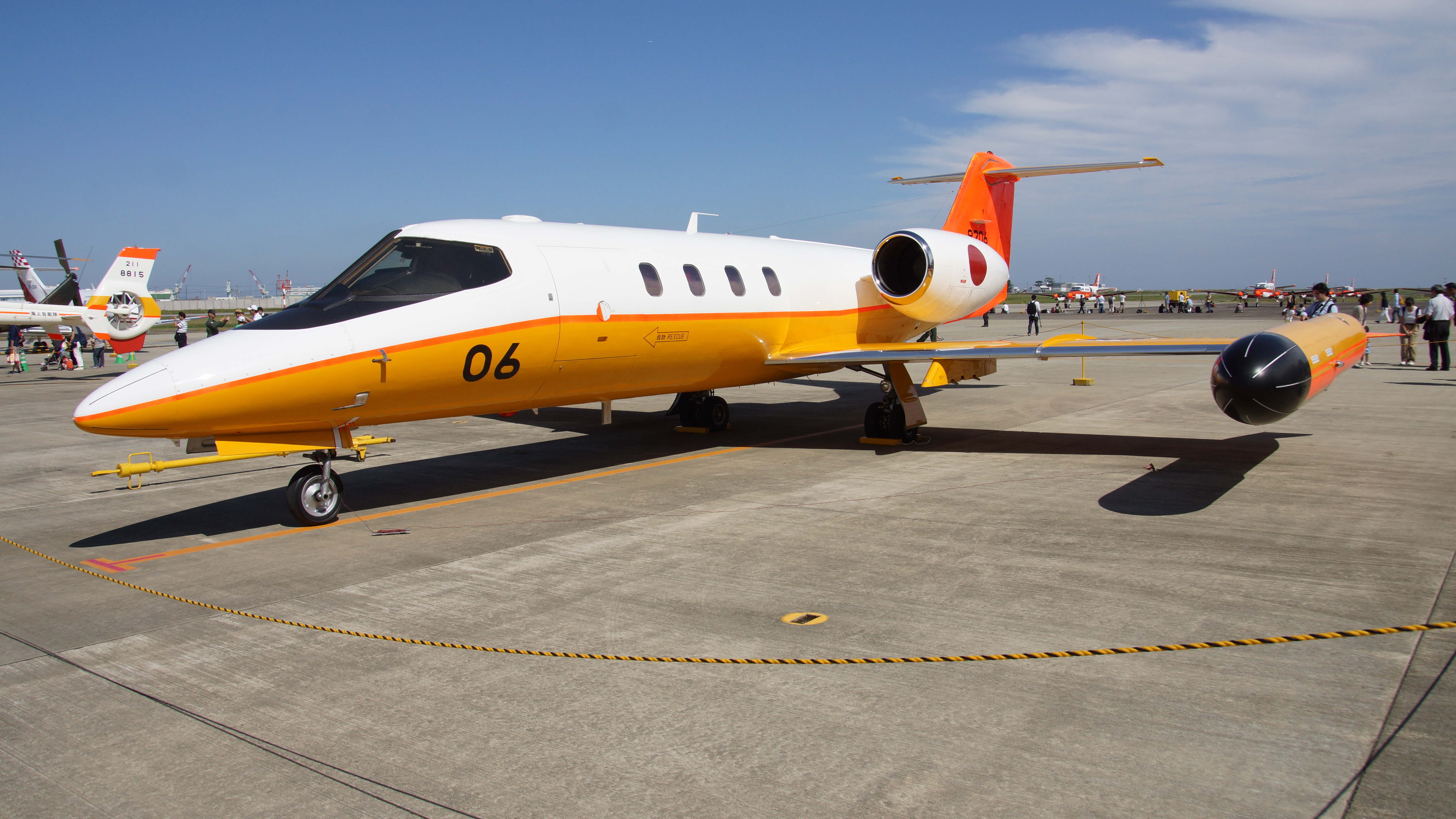 海上自衛隊 U-36A訓練支援機（9206号機） 左前面。2017年9月30日 徳島航空基地にて。